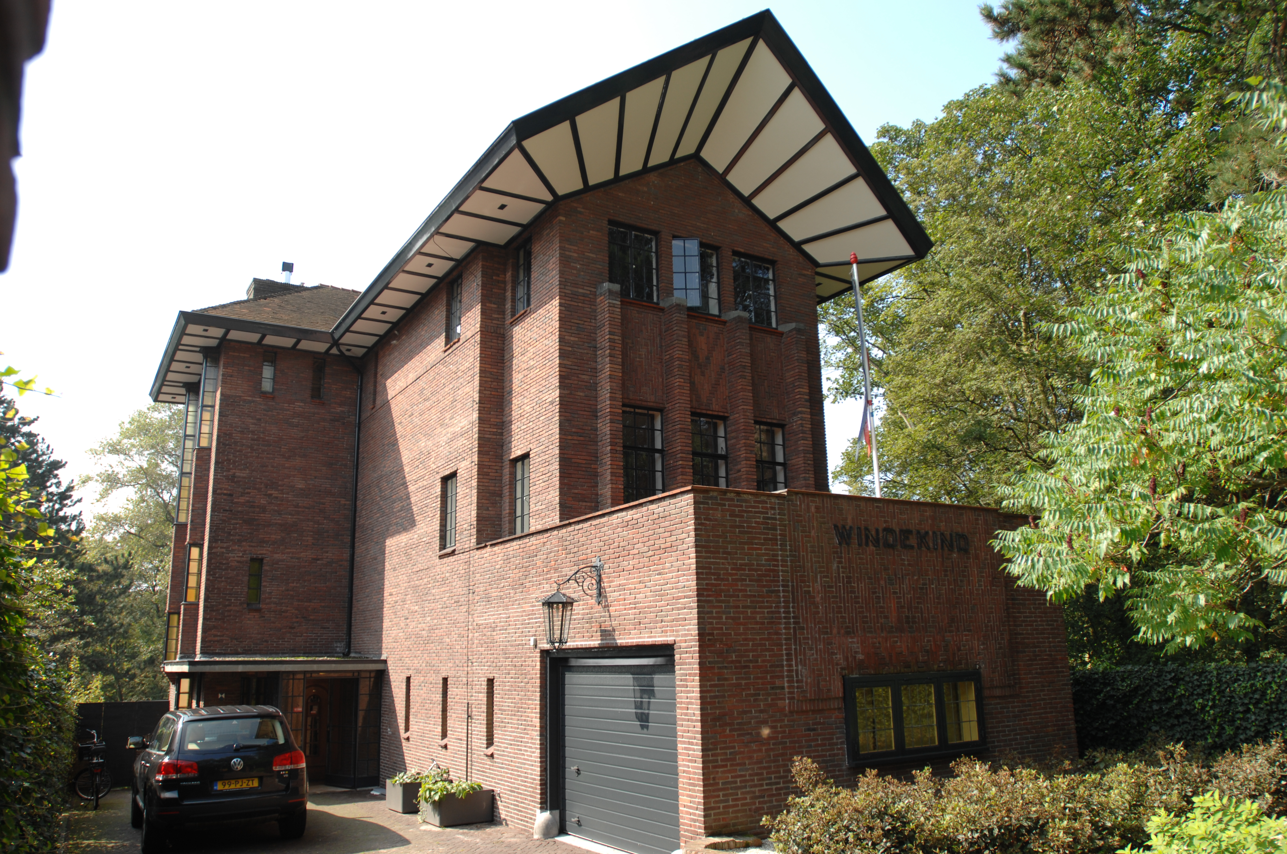 Vrijstaande villa uit 1927-1928, genaamd Windekind - Nieuwe Parklaan 76 te Den Haag